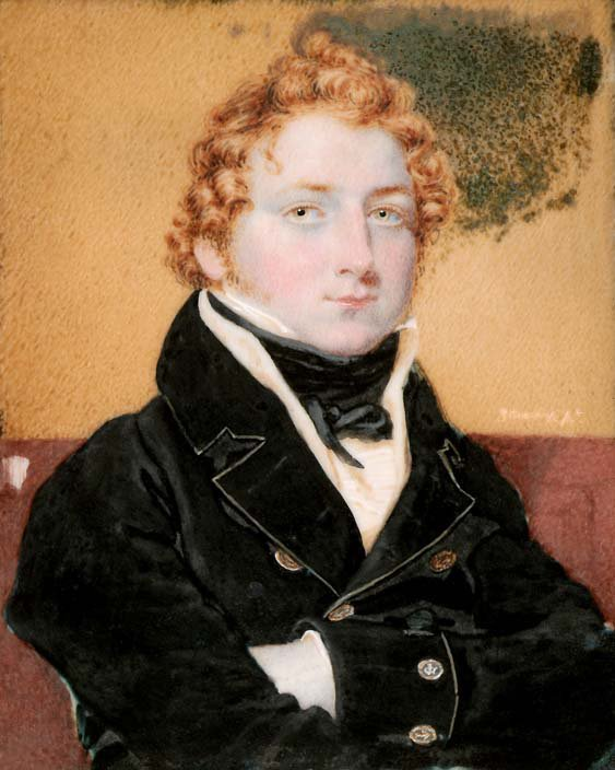 Pintura retrato de Jorge Young Holmes